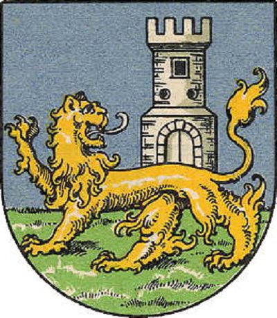 Wappen von Hainburg an der Donau